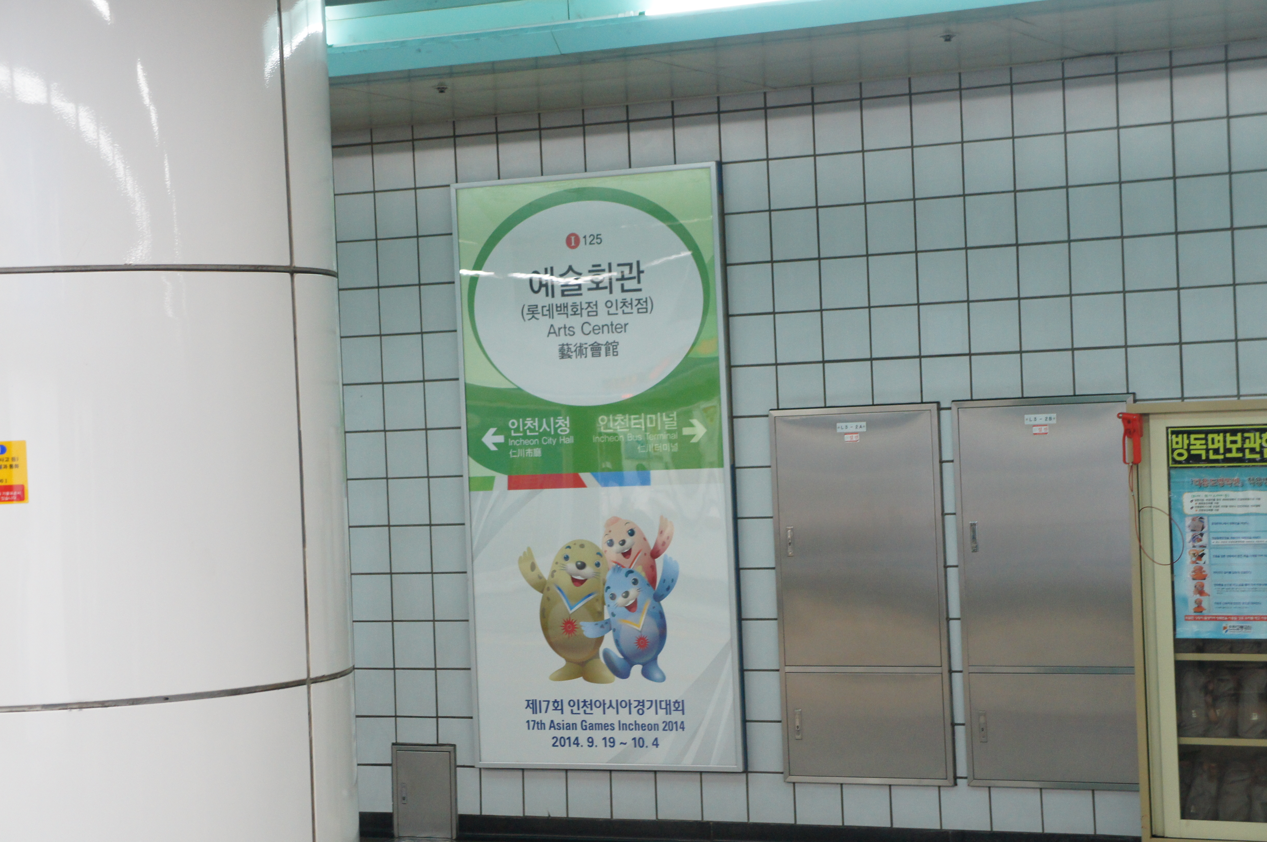 예술회관역 역명판